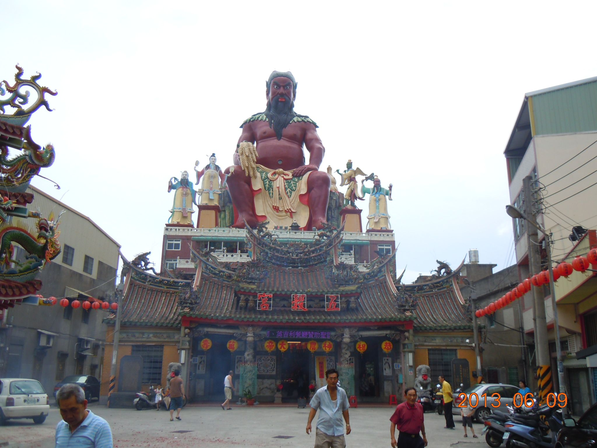 竹南五穀宮地址:苗栗縣竹南鎮五谷街16號。